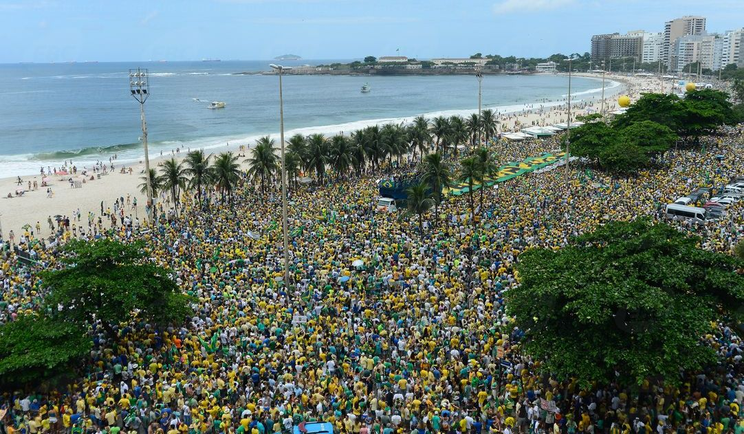 Manifestação no Rio de Janeiro contra corrupção e o governo Dilma.